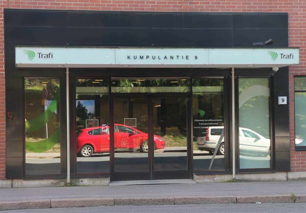 Sisäänkäynti Liikenteen turvallisuusvirasto Trafin pääkonttoriin Helsingin Vallilassa. Trafin tehtävänä on vastata liikenteen sääntely- ja valvontatehtävistä, kehittää liikenteen turvallisuutta sekä vähentää sen ympäristöhaittoja.